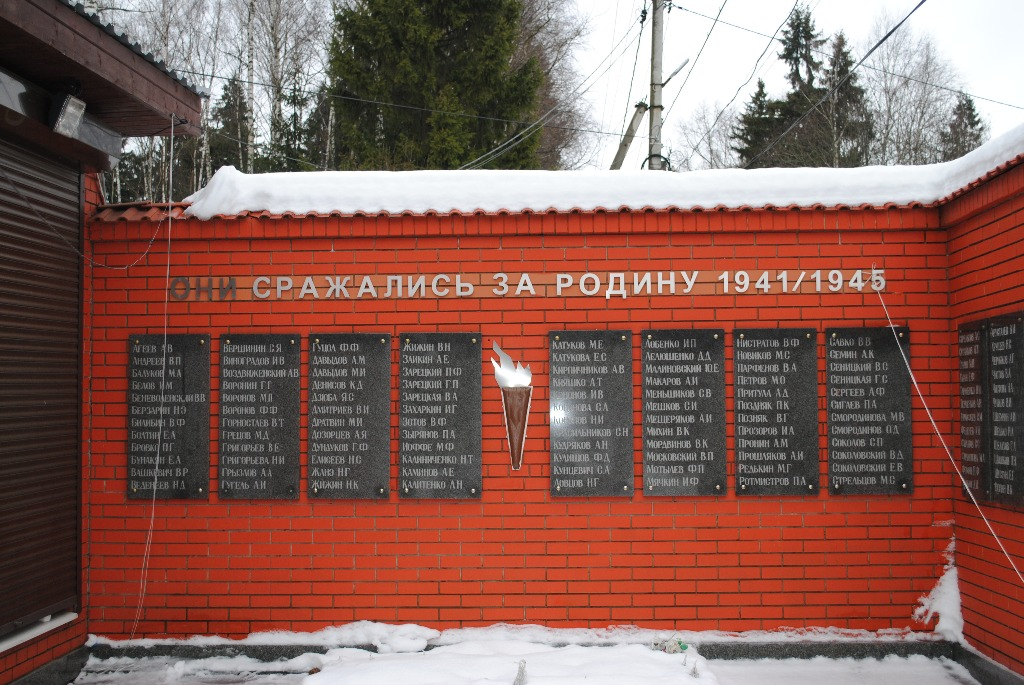 Парк Героев поселок Трудовая Северная